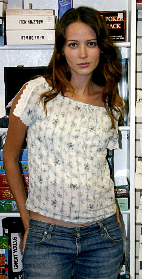 Amy Acker at a signing in Santa Barbara.